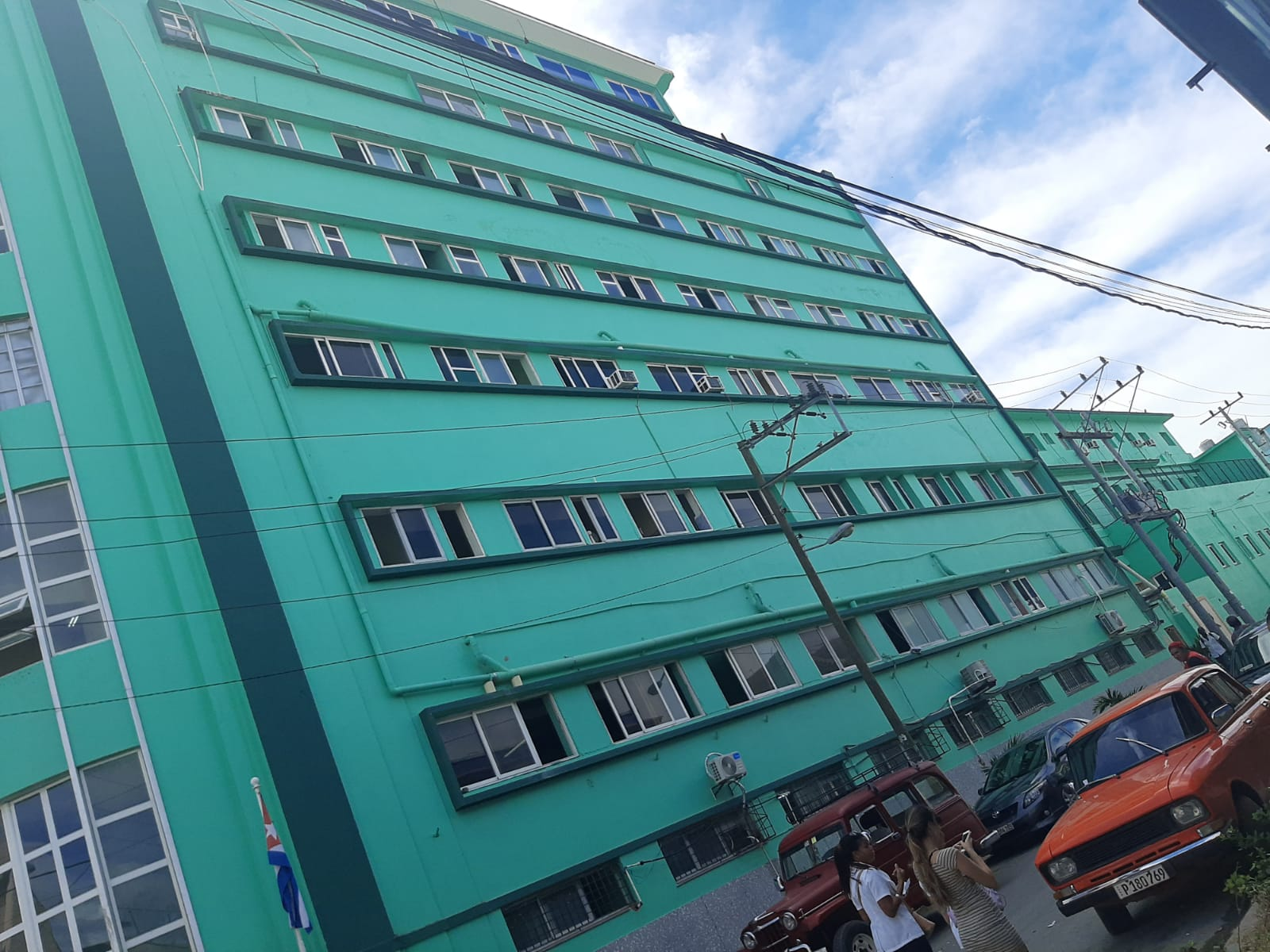 Hospital hístórico de Cuba que forma parte de la historia de España, Galicia y Cuba